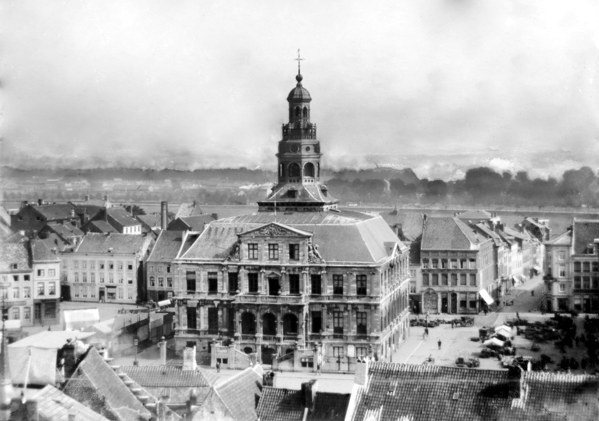 Stadhuis: van af het Observatorium der Hogere Burger School (opmerking: Indicatie datum opname: vóór 1923)